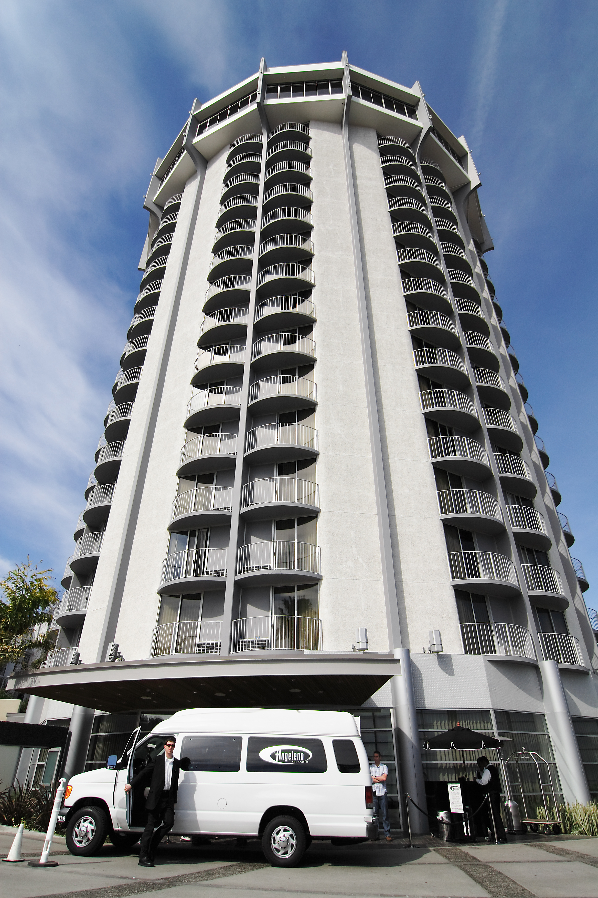 Hotel Angeleno